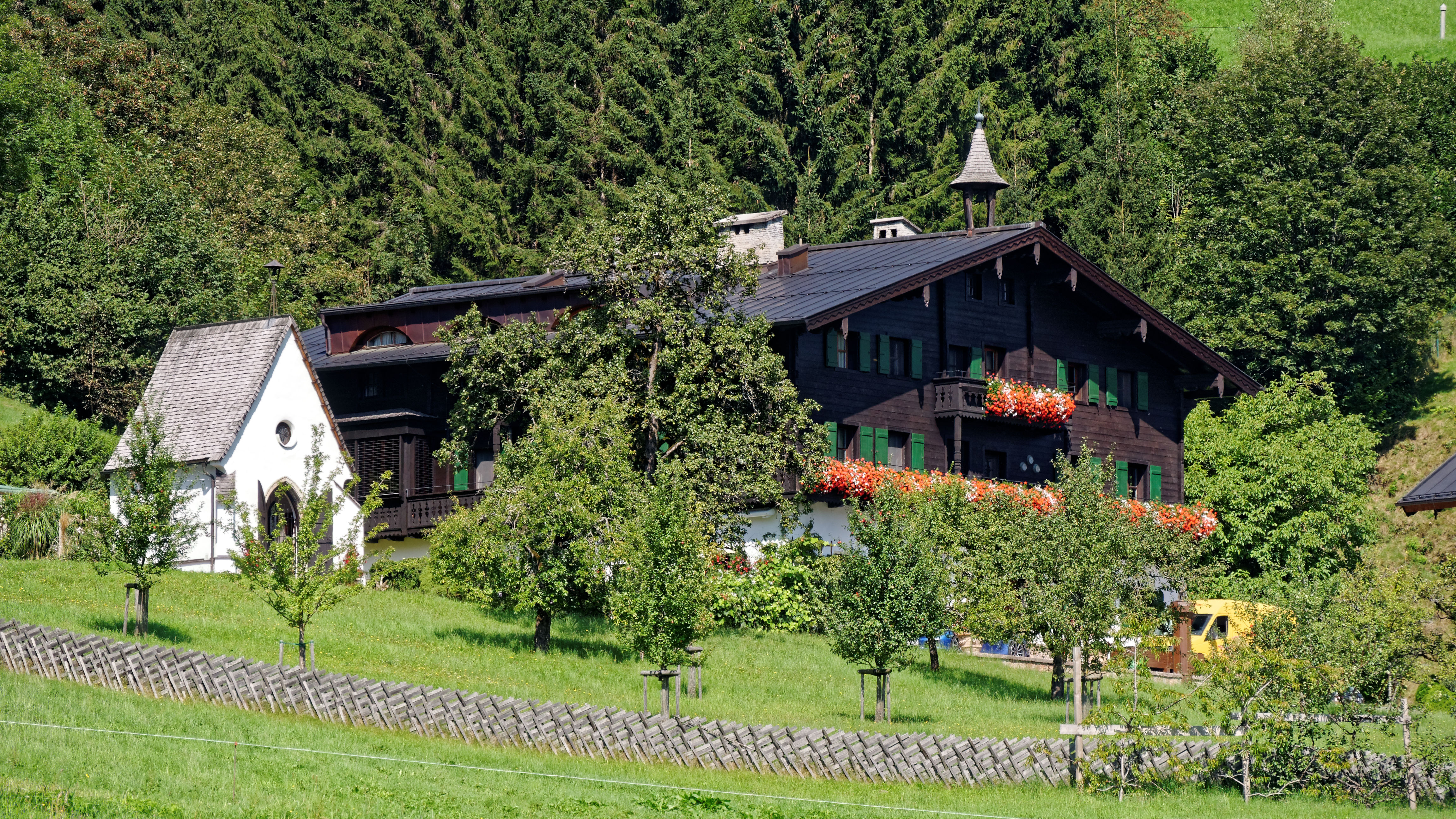 Blick vom Schüttdorf hinauf zum Schüttgut der Familie Porsche. Auf der linken Seite befindet sich die Hauskapelle.